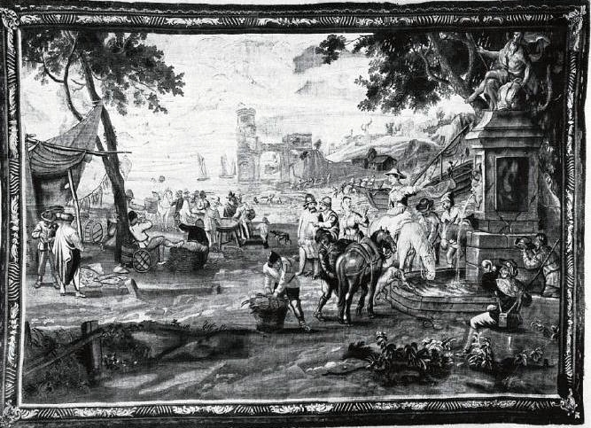 Wandteppich Hafenszene nach Teniers. ehemaliges Eigentum Emma Budge, Raubkunst, Restitution des Hotels Vierjahreszeiten Hamburg